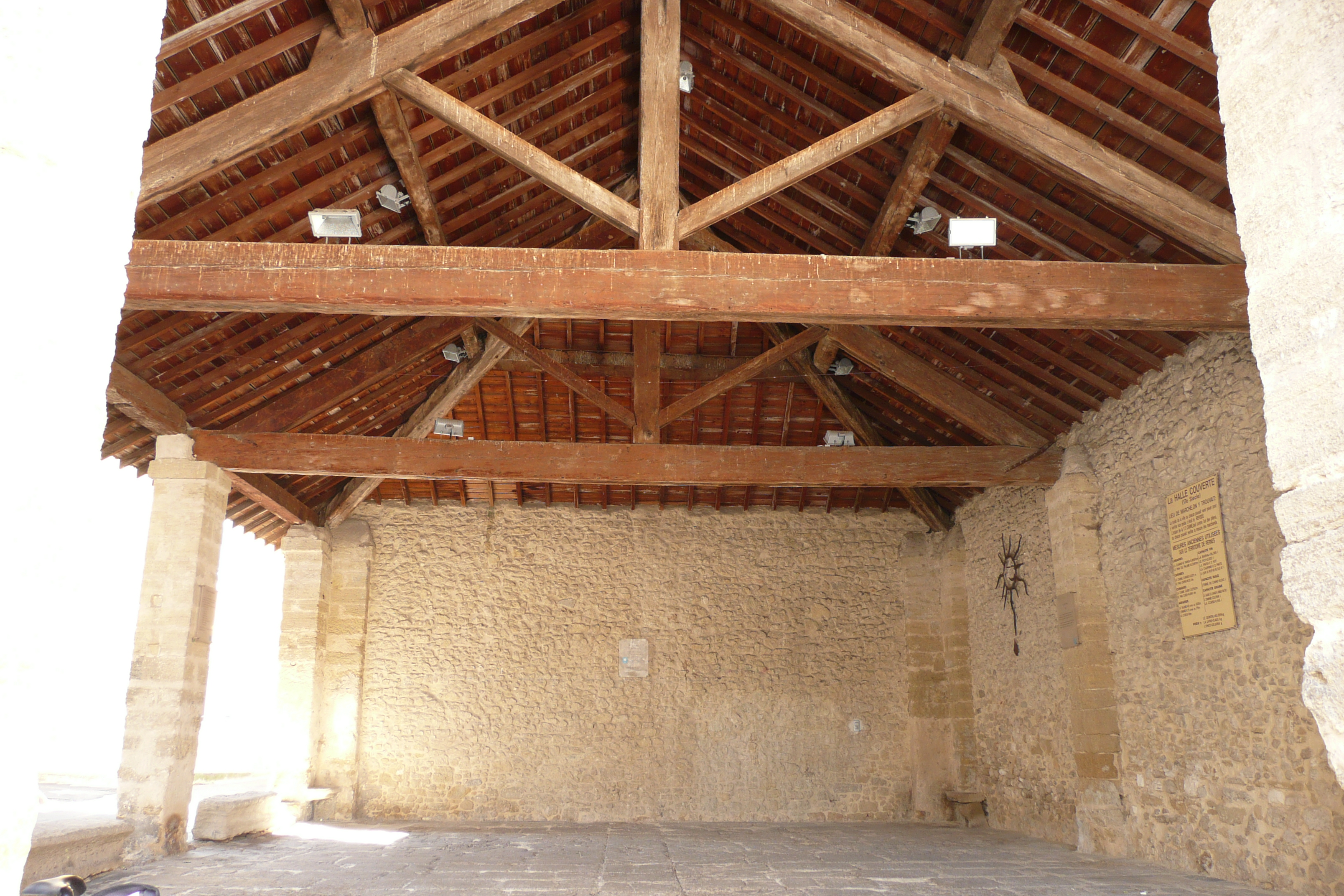 Vue de l'intérieur de la halle couverte du 17ème siècle à Pernes-les-Fontaines.